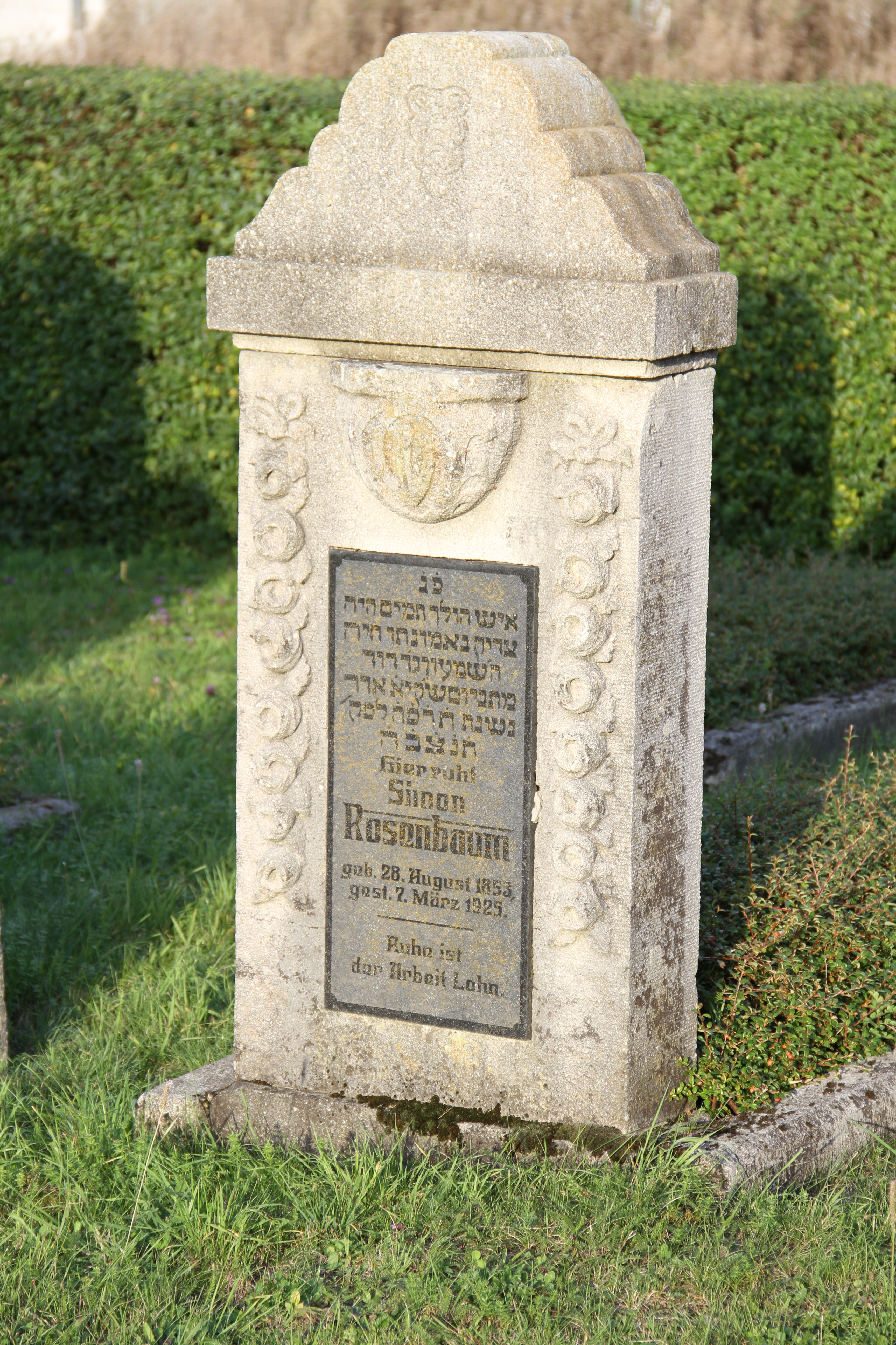 Dieses Foto entstand im Rahmen des Projekts Wiki Loves Monuments Mittelhessen, das aus dem Community-Projektbudget von Wikimedia Deutschland e. V. gefördert wurde.